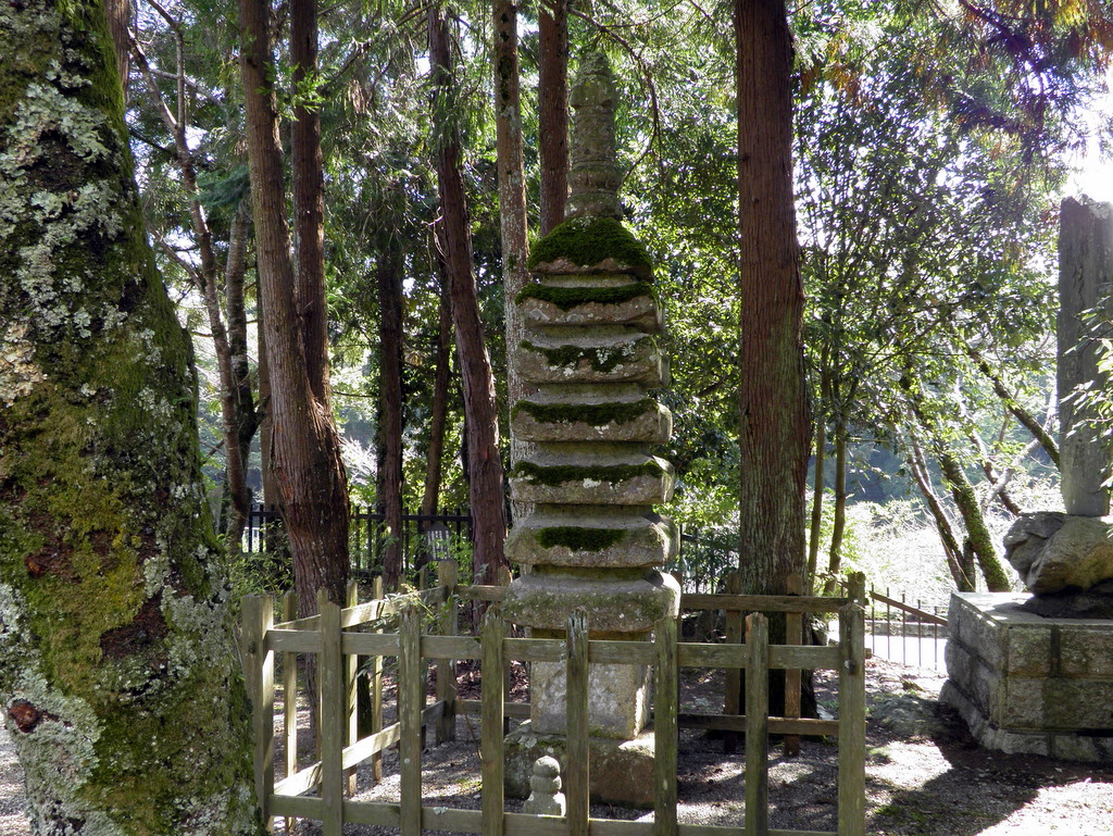 栄山寺石造七重塔（奈良県五條市）